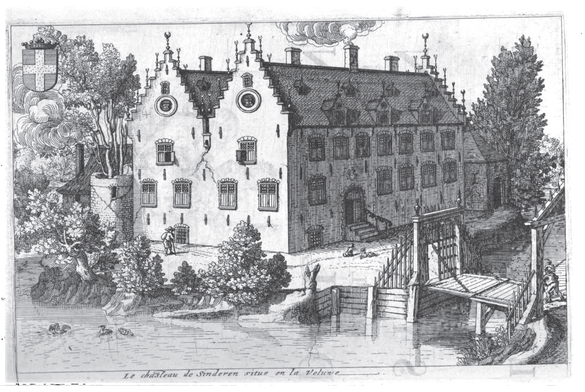 l'ancien chateau de Sinderen